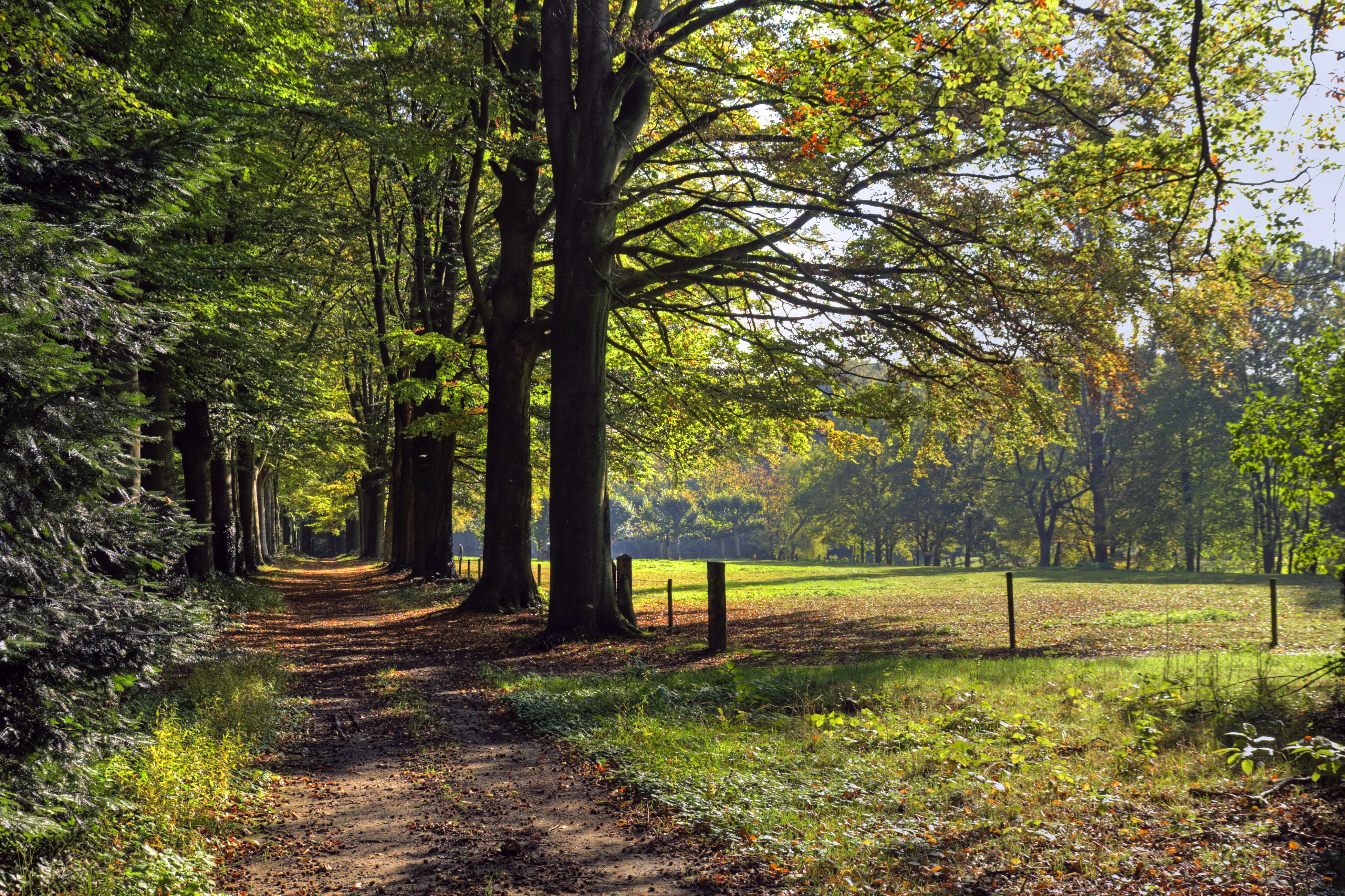 Hillenraederlaan ten zuiden van Swalmen op een mooie herfstdag